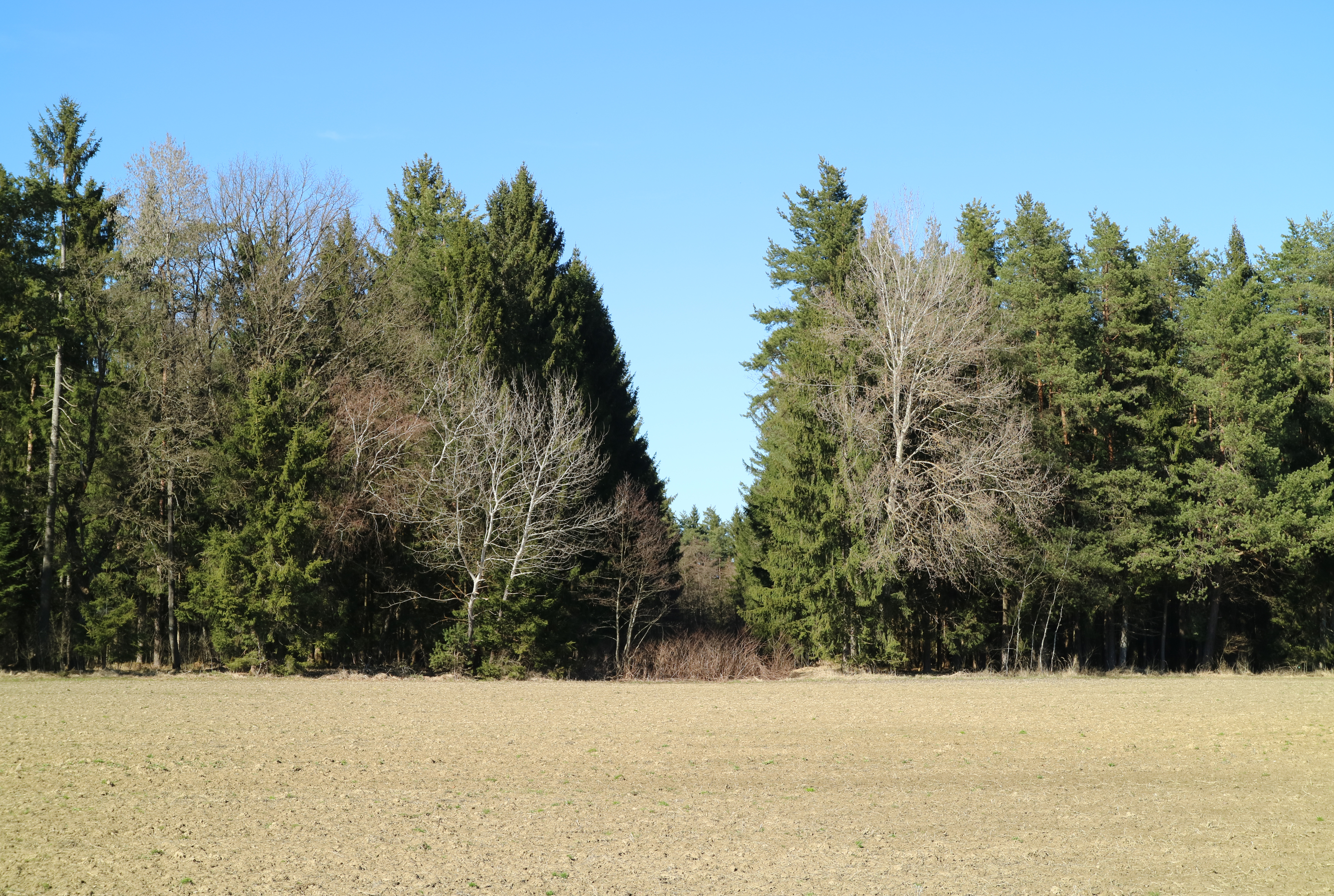 Schneise (Trasse) der ehemaligen Muna-Anschlussbahn im Kaiserwald bei Graz